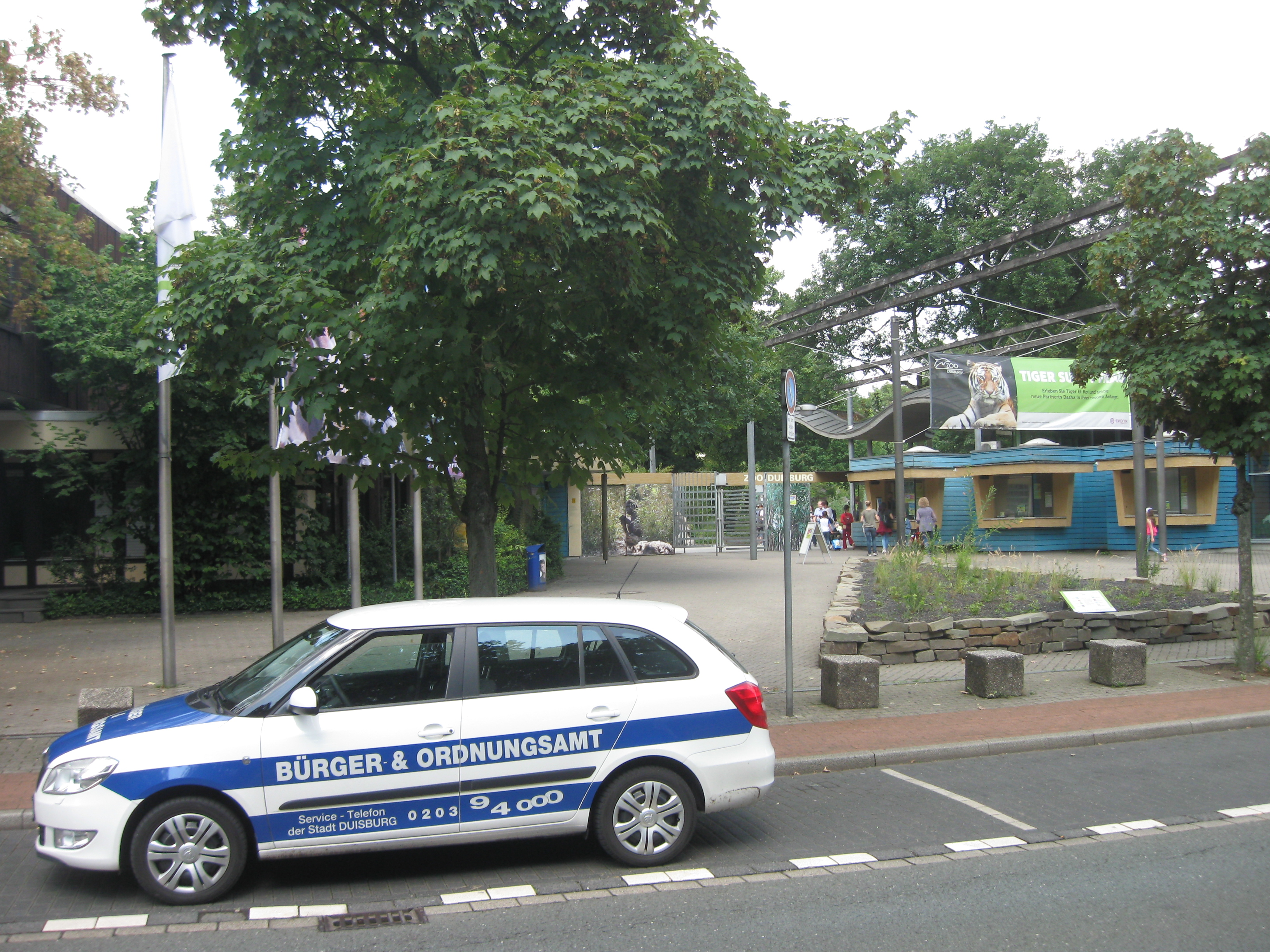 Coche patrulla de la Policía Local de Duisburgo en frente a la entrada al Zoológico.